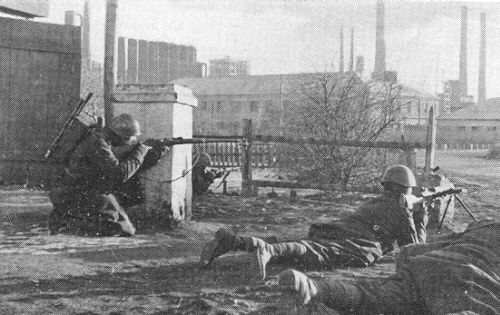 1941. Бой на улицах Сталино